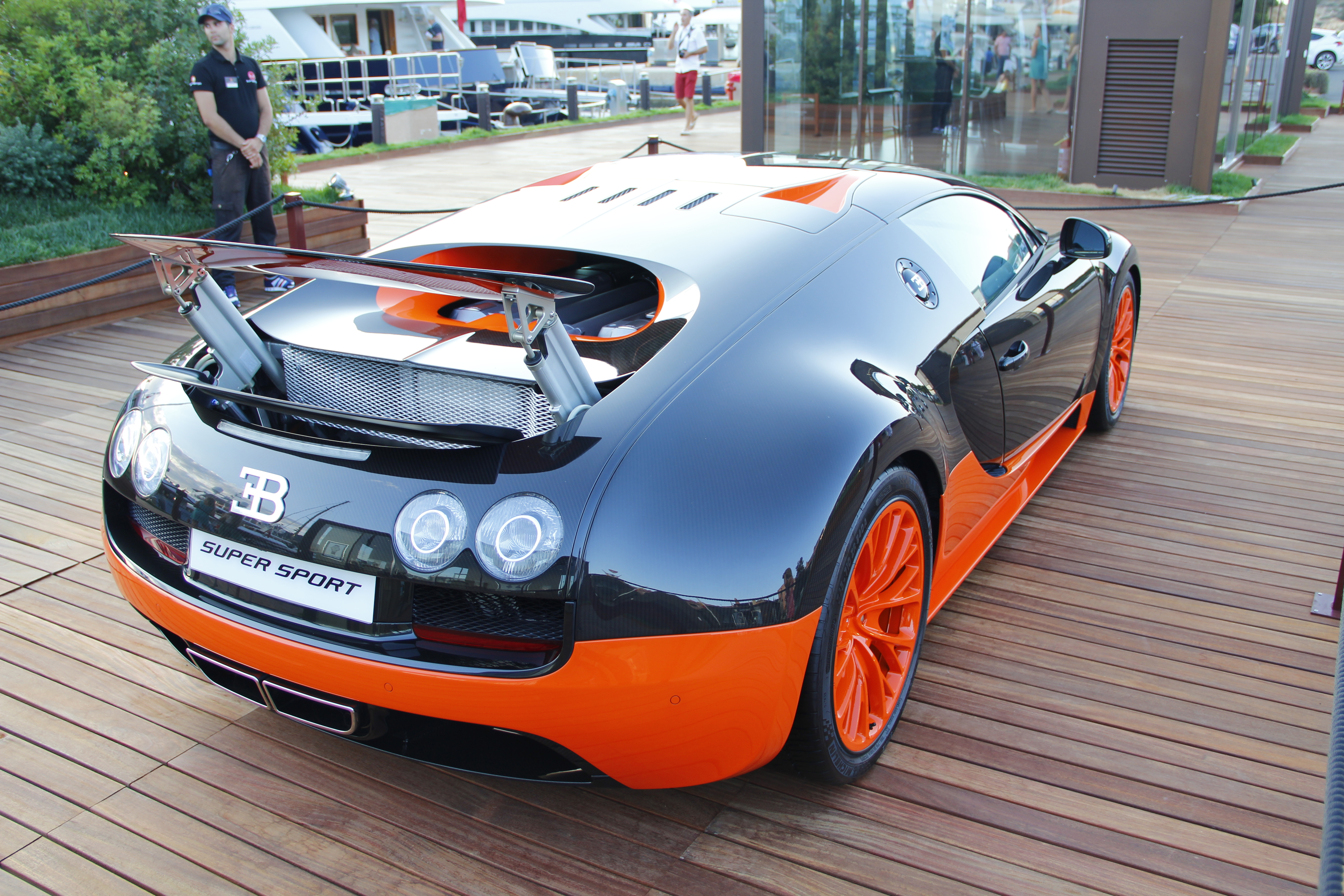 Bugatti , Porto Cervo, Sommer 2013